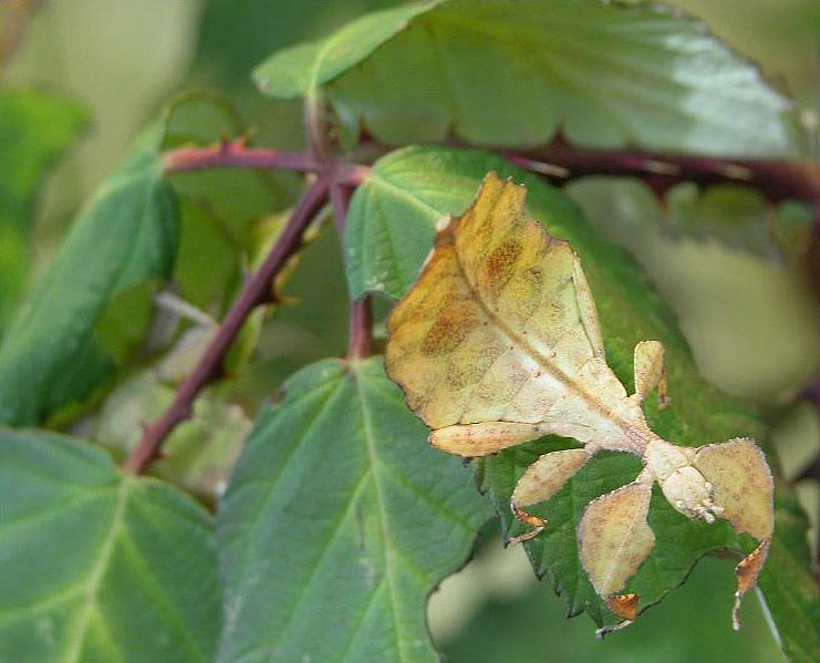 Wandelndes Blatt (Phyllium celebicum), Aufgenommen mit einer Nikon Coolpix 5700 im Frankfurter Zoo.